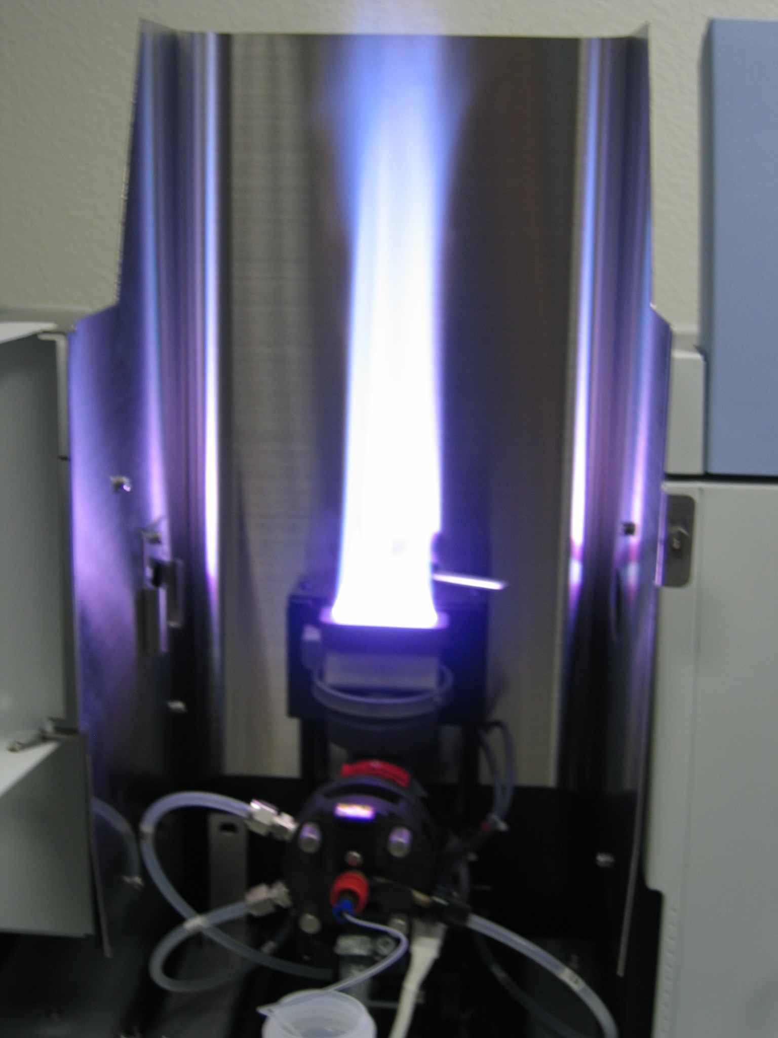 Das Bild zeigt eine Lachgasflamme ohne hohe Salzfracht durch Alkali-/Erdalkalielemente. Zu beachten ist, dass die Färbung nicht ganz korrekt wiedergegeben ist (der Detektor der Digitalkamera wird durch das energiereiche Licht geblendet und kann den violetten Saum von ca. 3cm über dem Brennerkopf nur als weißes Licht aufzeichnen.). Die violette Färbung ist in der Spiegelung an den Seiten des Brennerraums erkennbar.